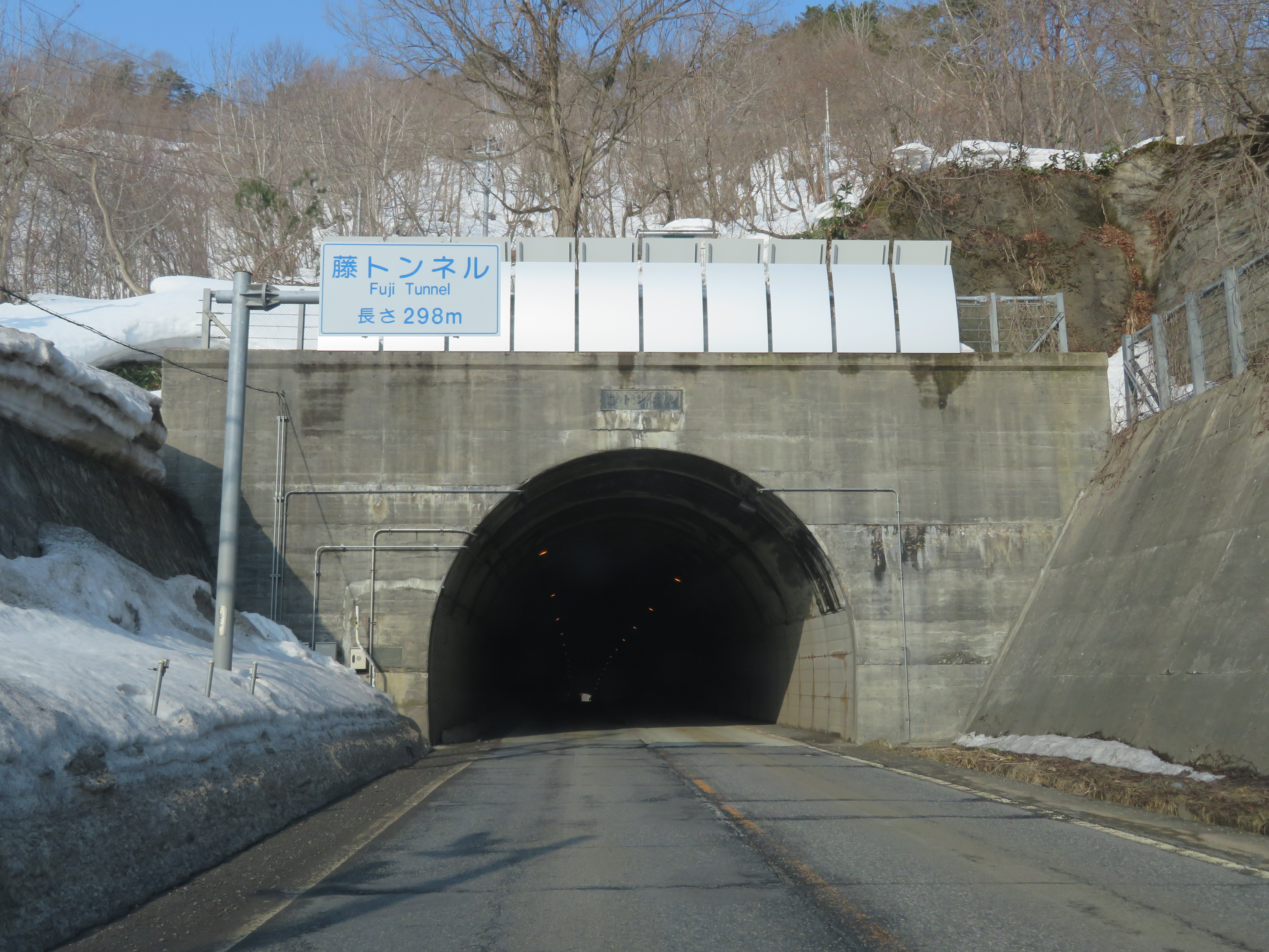 国道49号線藤トンネル（会津若松方面側坑口から撮影）